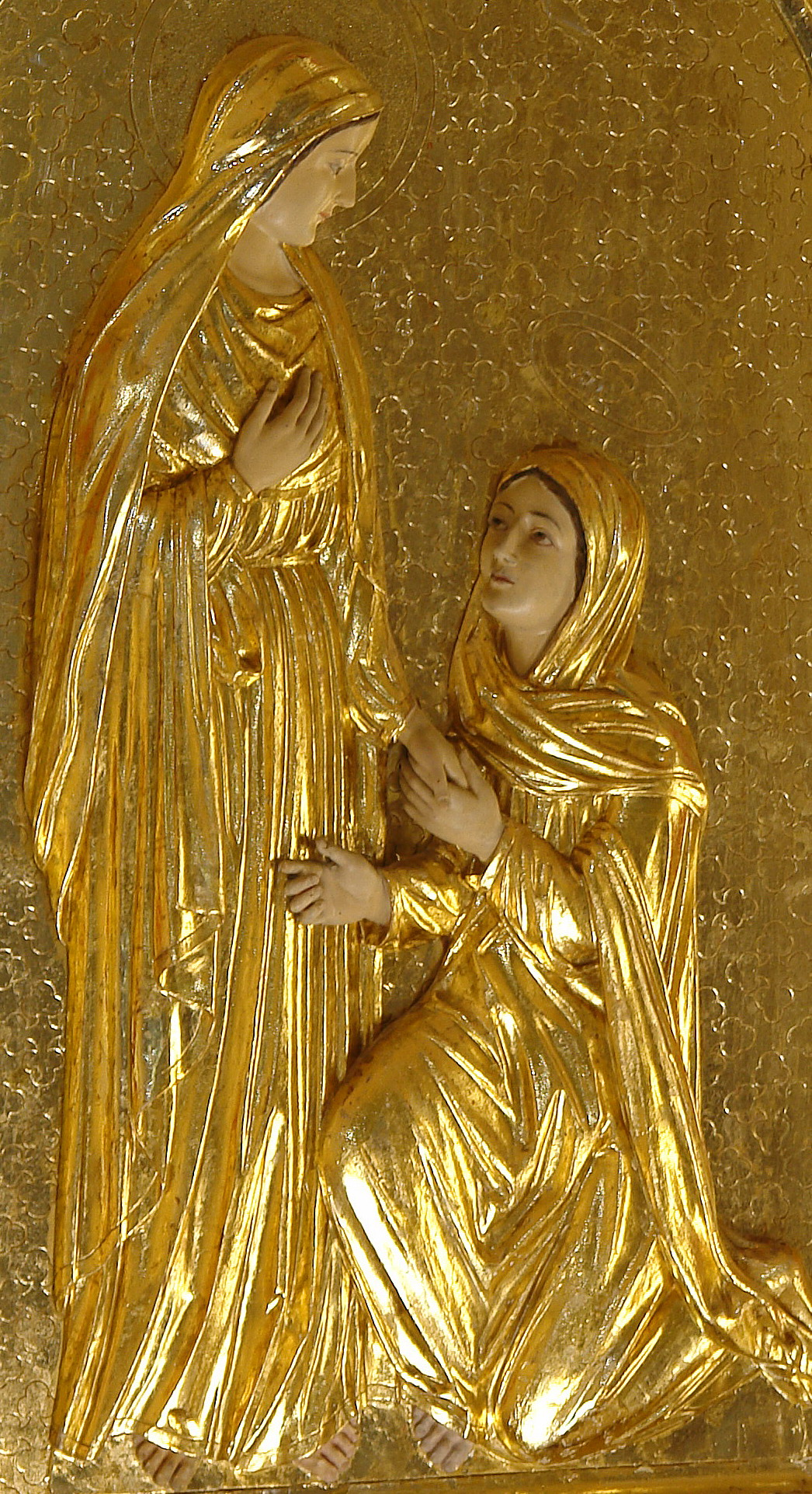 Iкона зустрiчі Пресвятоi Богородицi та Св.Єлизавети, у каплиці с.Тучне